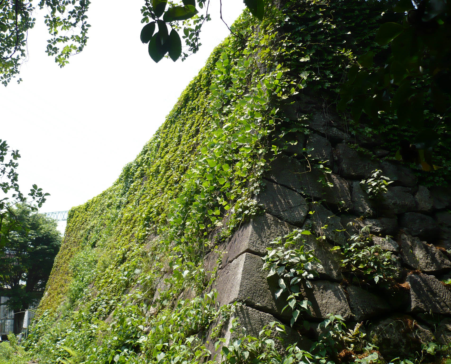 天守台跡